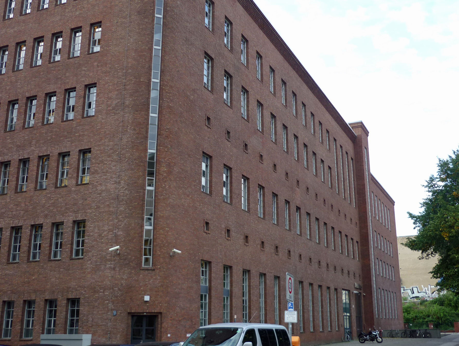 Metahaus in Berlin-Charlottenburg